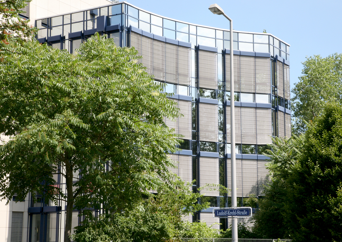 Das Tridomus Haus beherbergt die Arbeitsgruppen und Einrichtungen des CBTM sowie Verwaltungseinheiten der Fakultät.